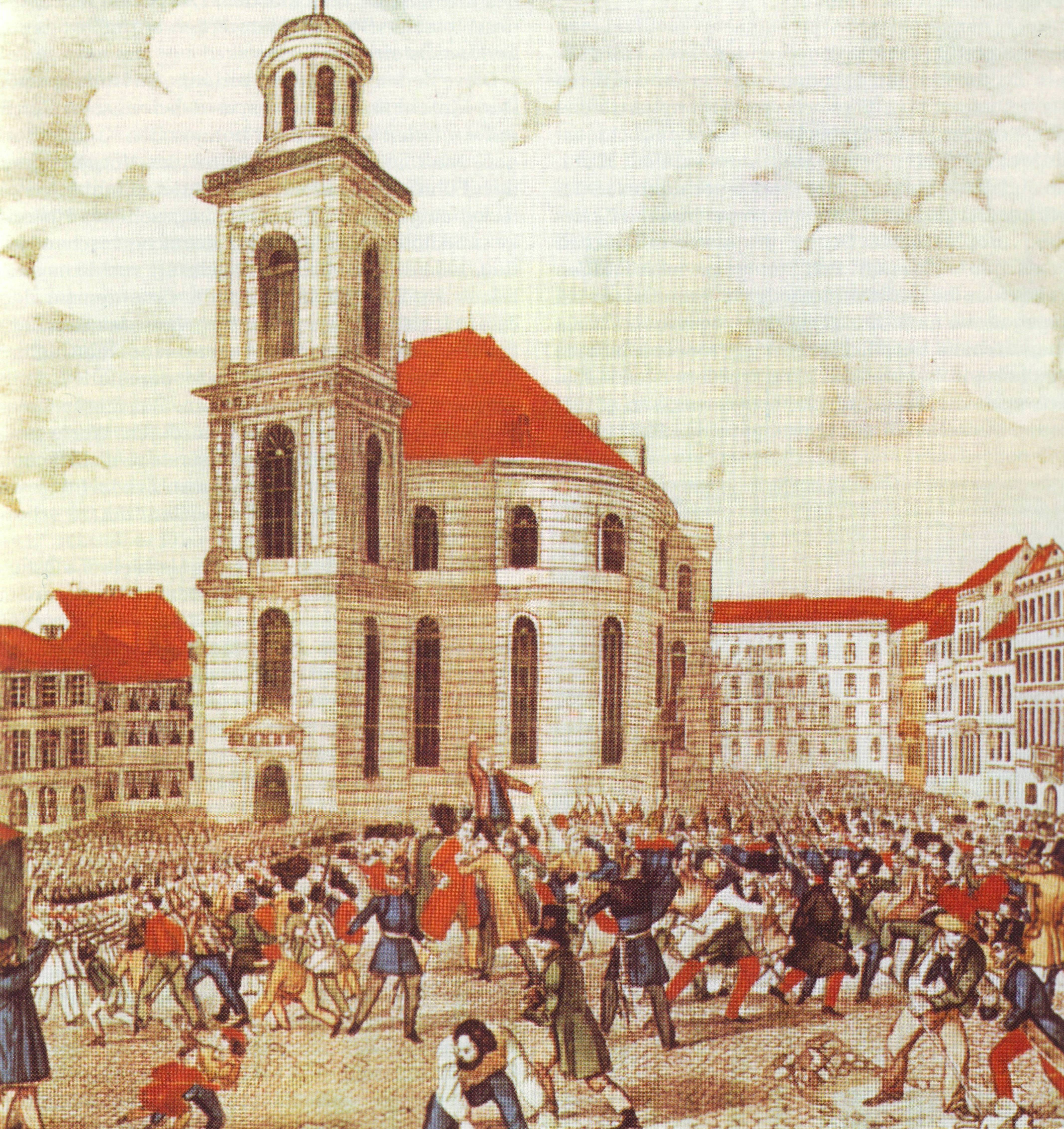 September-Unruhen in Frankfurt.